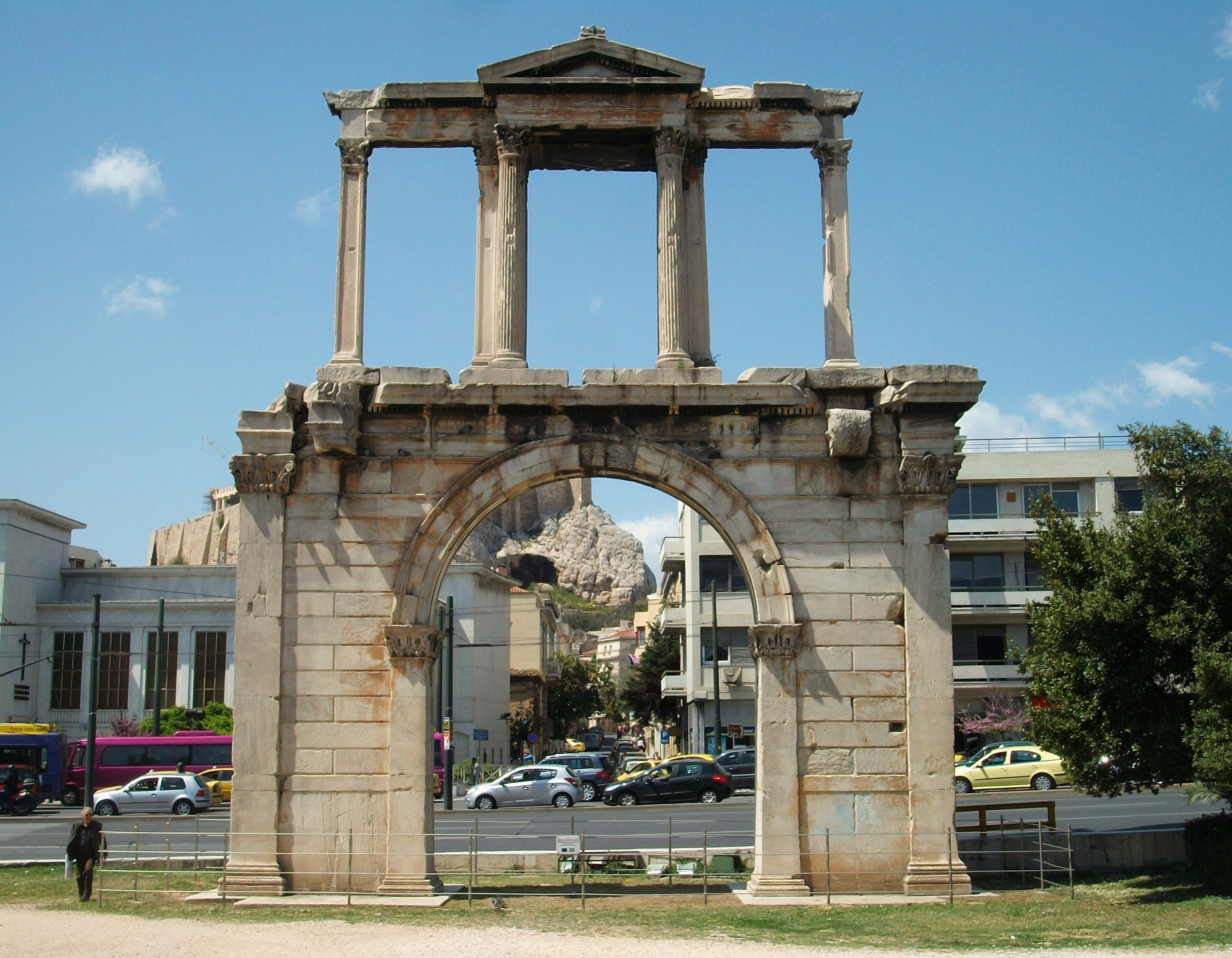 Arc d'Adrià, Atenes.